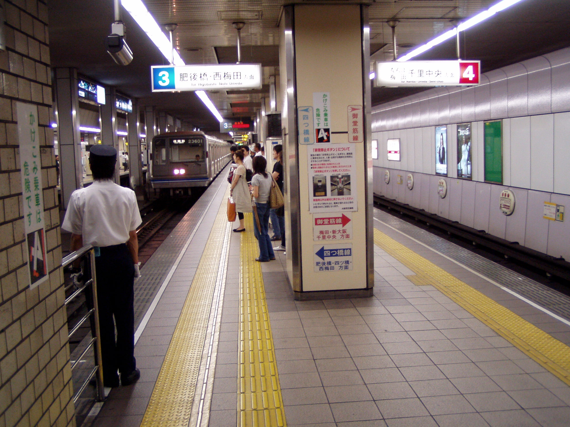 Osaka. Daikokucho station on Metro lines Midosuji and Yotsubashi.